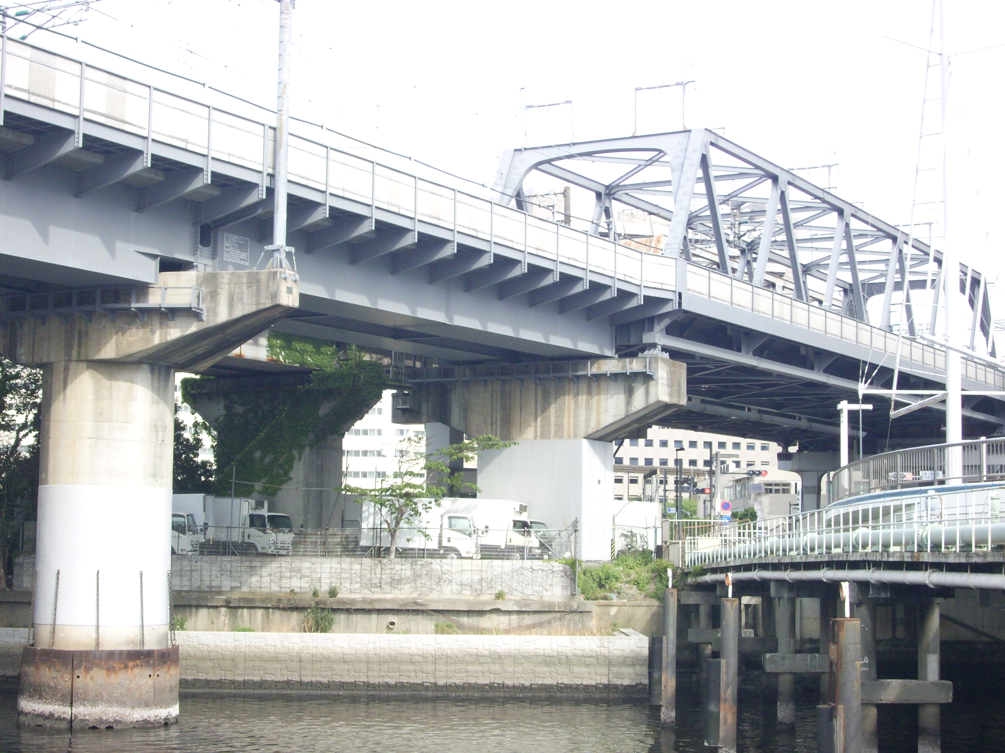 東海道新幹線大井車両基地引き込み線：高浜運河の円柱橋脚と浜路橋鉄橋 ㊟カメラを起動すると日付機能が出荷時のものに初期化されるため、ファイル履歴の撮影日時とメタデータの原画像データの生成日時が異なります